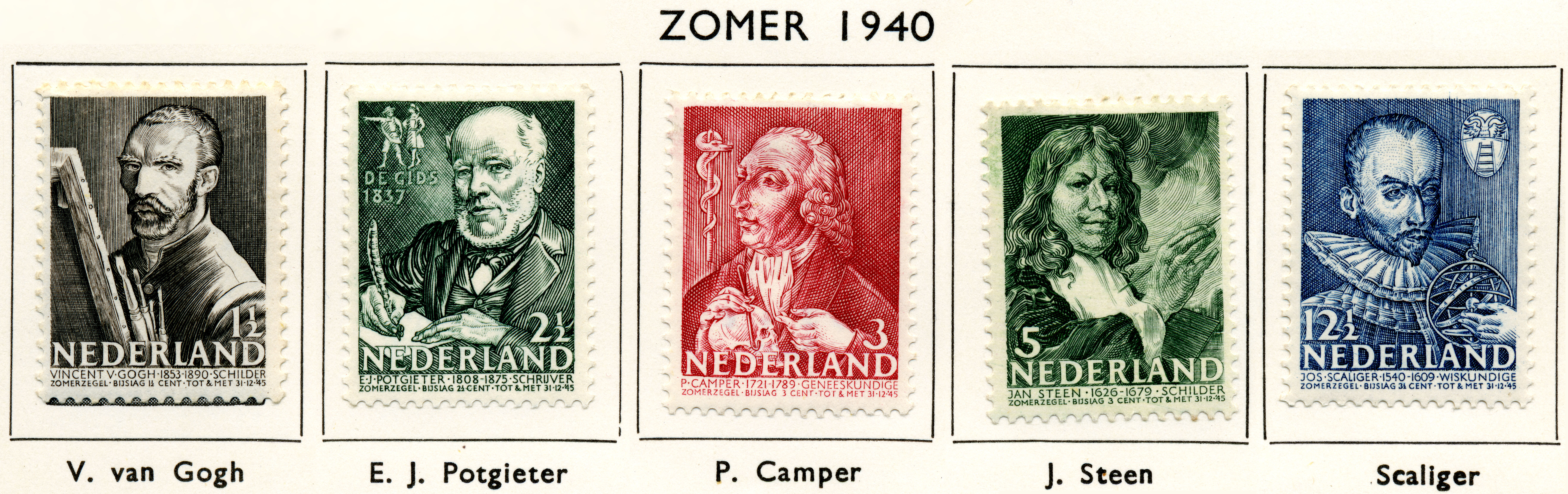 Zomerzegels (1940) Vincent van Gogh, schilder / E.J. Potgieter, letterkundige / Petrus Camper, geneeskundige / Jan Steen, schilder / J.J. Scaliger, taalkundige. NVPH nr 350-355. Ontwerpers Kuno Brinks (1½ ct), E. Reitsma-Valença (2½ ct), Hubert Levigne (3 en 12½ ct) en S.L. Hartz (5 ct)